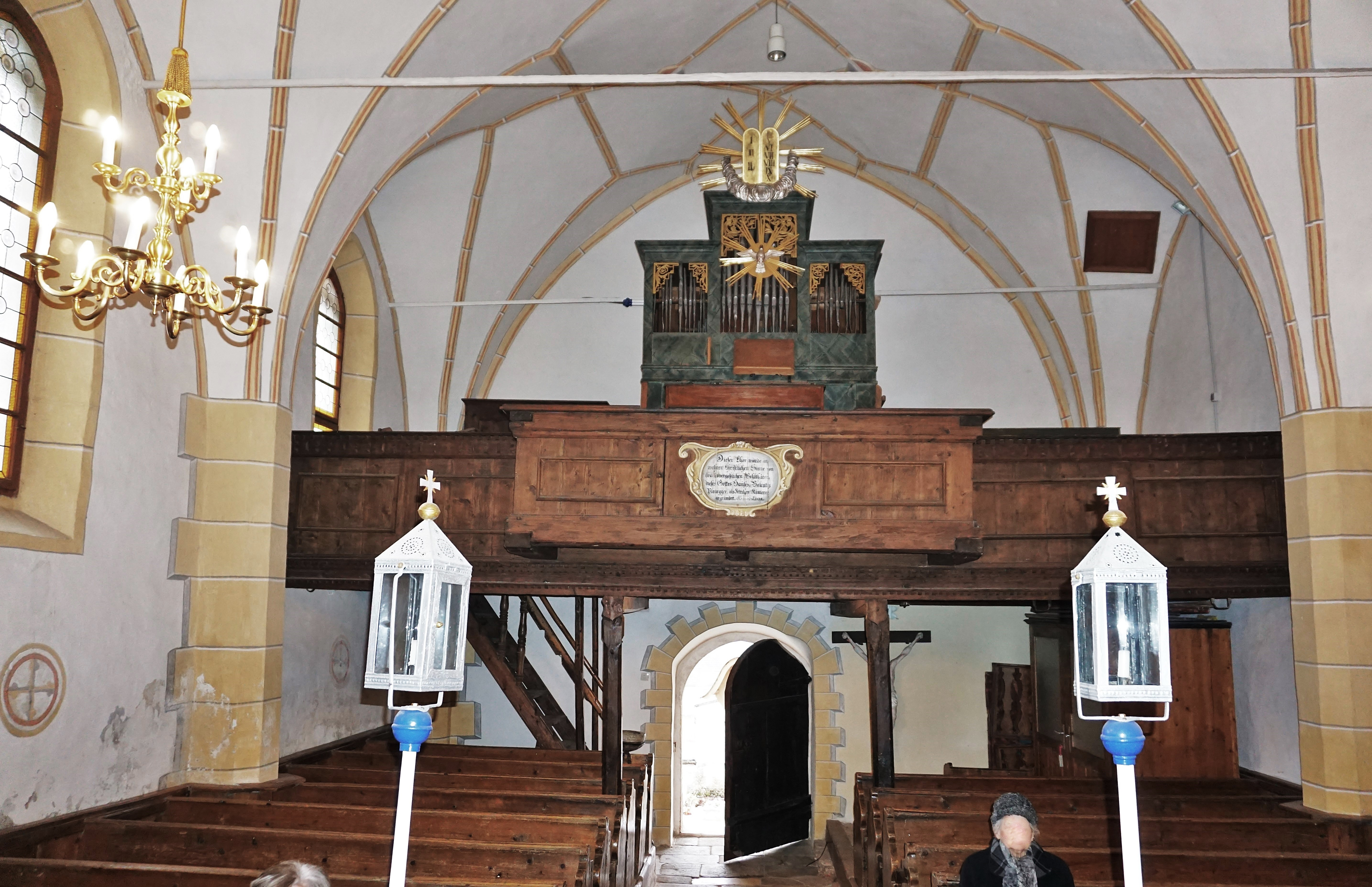 Kath. Filialkirche St. Michael in Gösseling, die Orgelempore